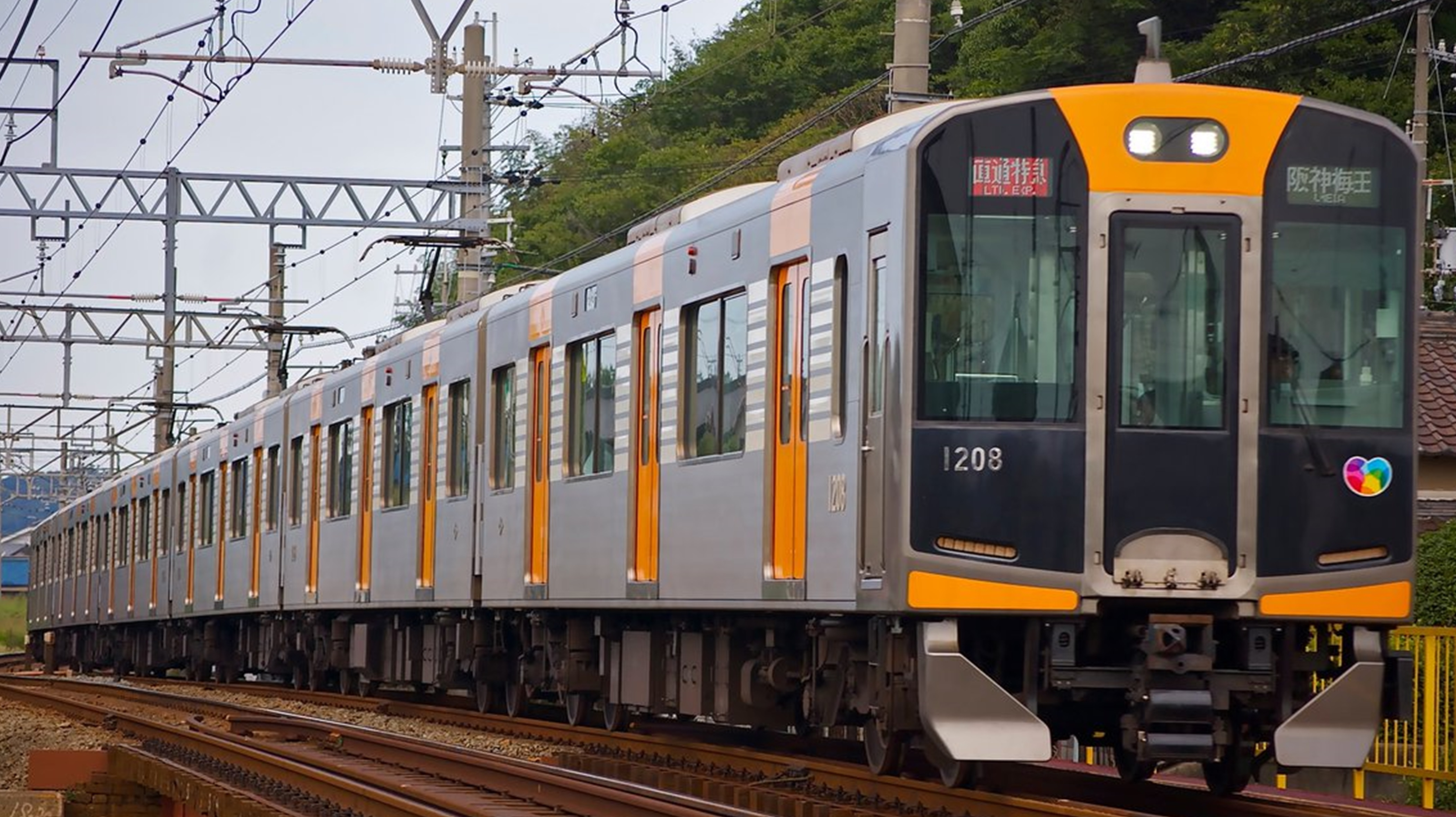 阪神1000系1208編成 直通特急梅田行き